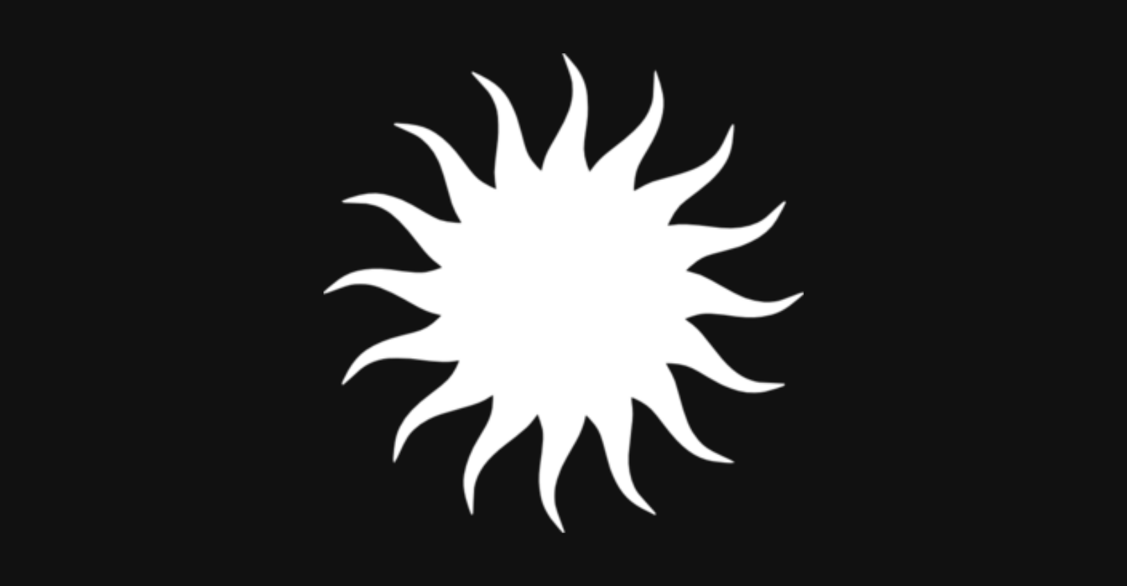 House Karstark-Game of Thrones Flag